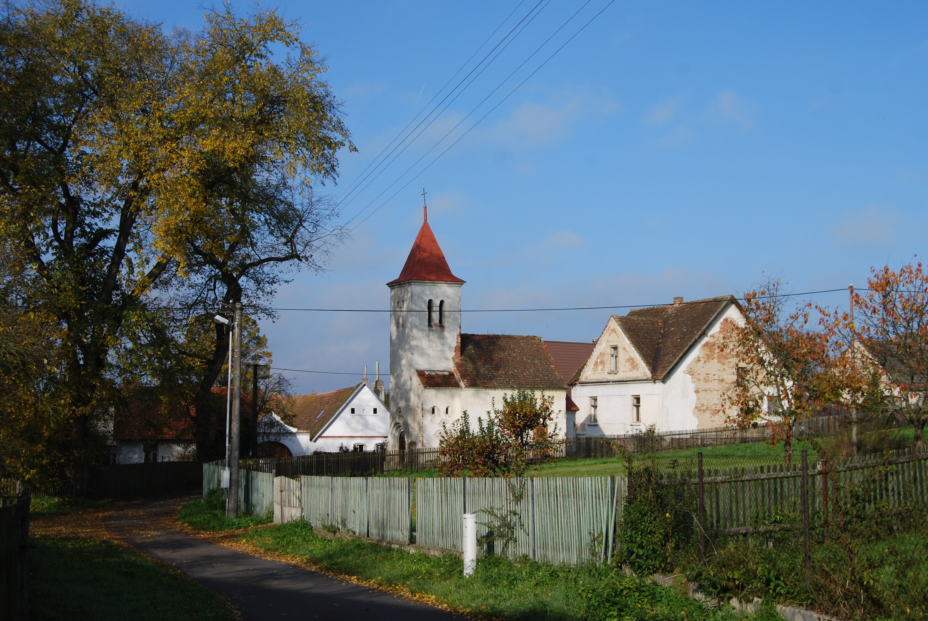 Návesní kaple. Vranov je část obce Dražíč v okrese České Budějovice. Česká republika.